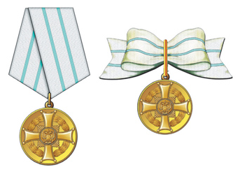 Медаль ордена «Родительская слава» (Российская Федерация), слева - для ношения на мужском костюме, справа - на женском